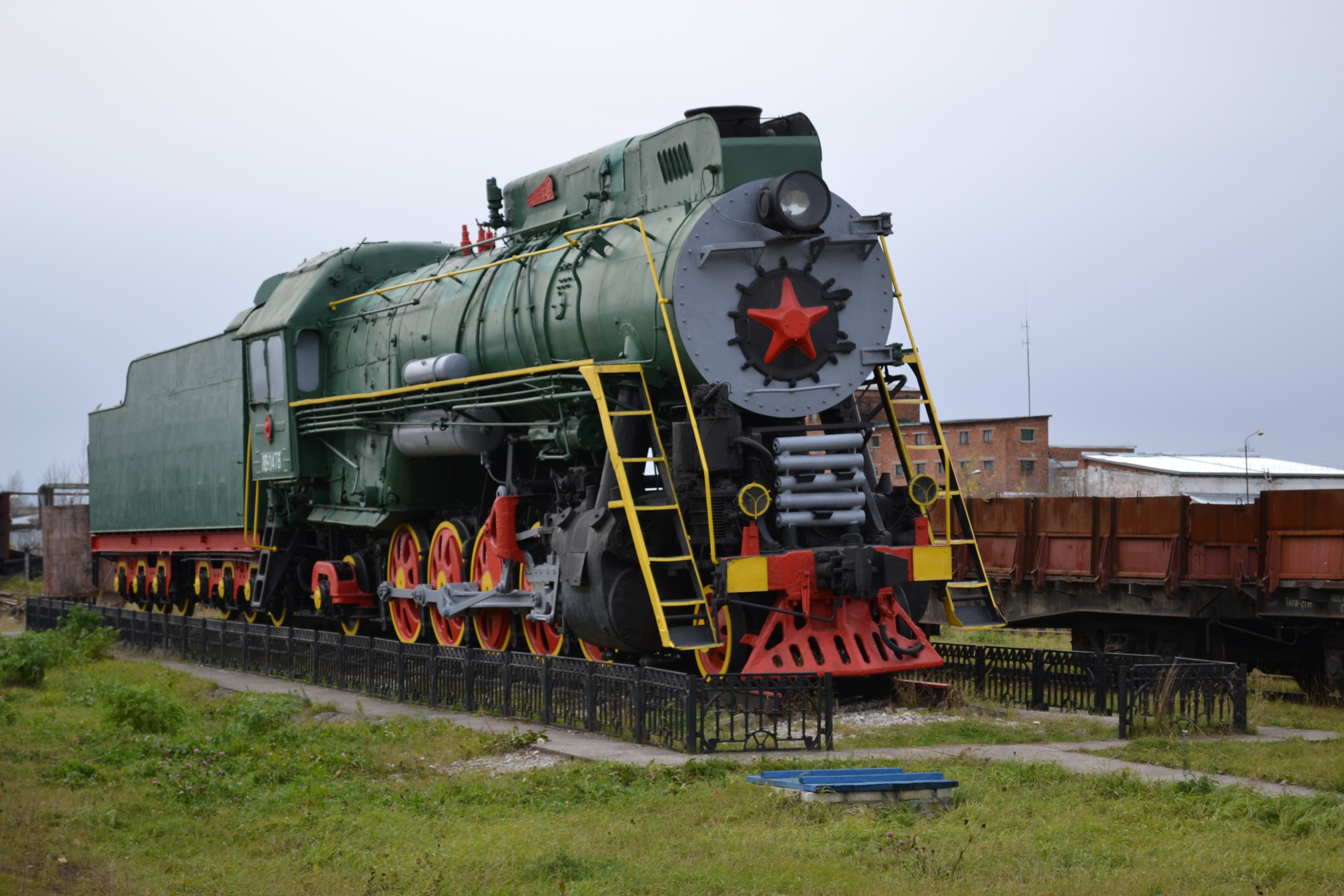 Памятник паровозу серии "ЛВ" в городе Печоре